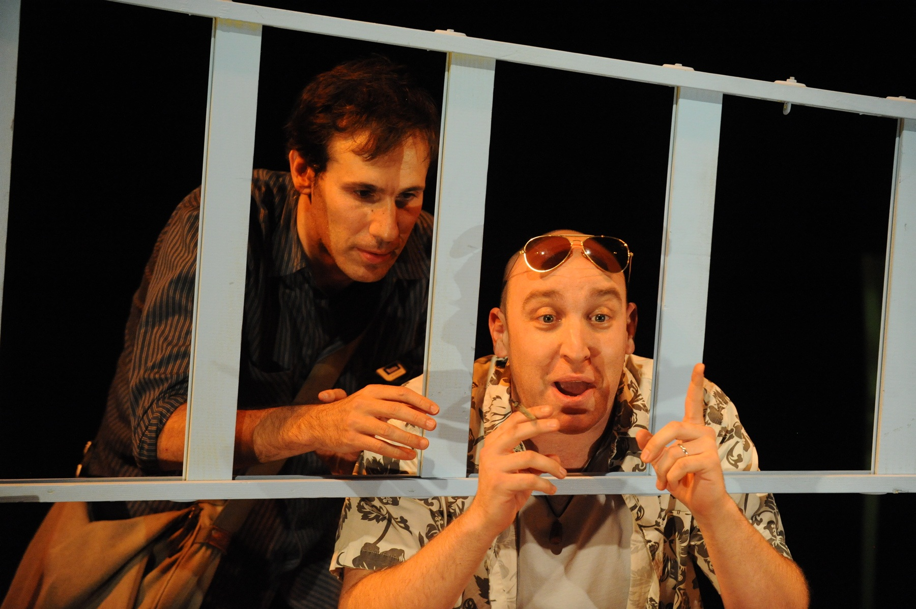 מנסה לחטוף 2